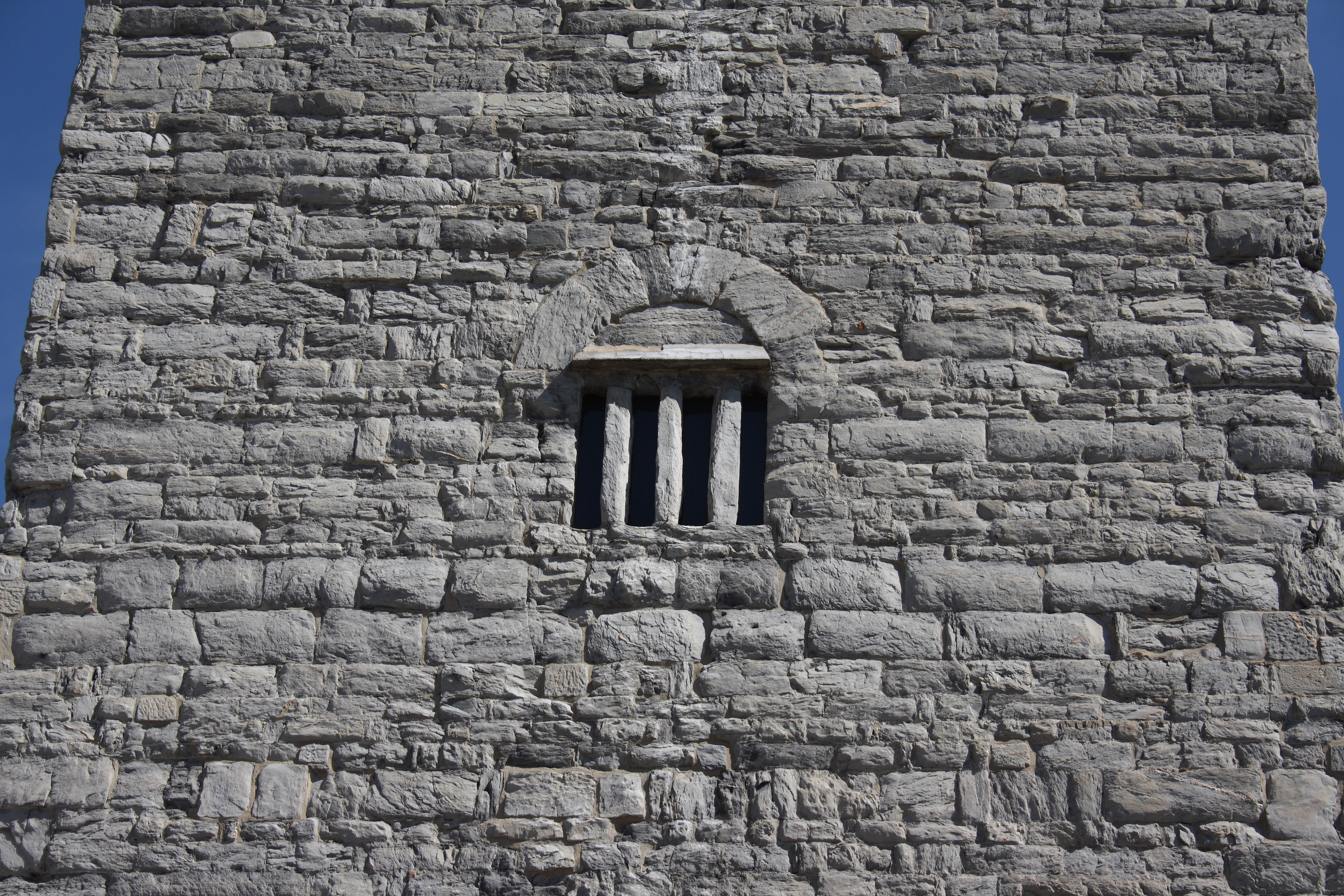 Tour Brune in Embrun, einer Gemeinde im Département Hautes-Alpes in der französischen Region Provence-Alpes-Côte d'Azur, aus dem 12. Jahrhundert, Teil des ehemaligen Bischofspalastes, Ansicht von Westen (Detail)